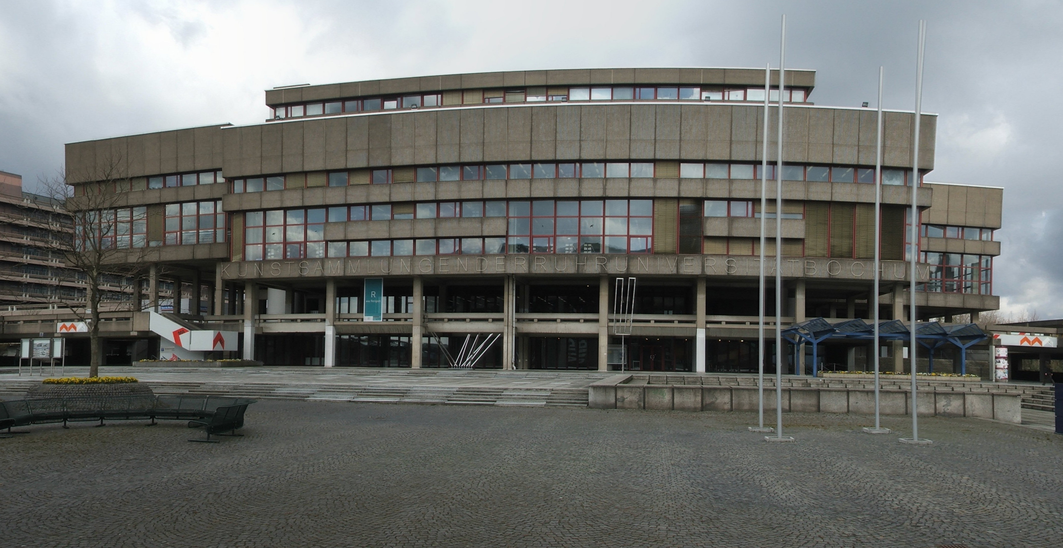 Universitätsbibliothek Bochum und Kunstsammlung